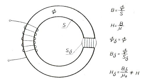 Figura 3. Qarku magnetik i përbërë